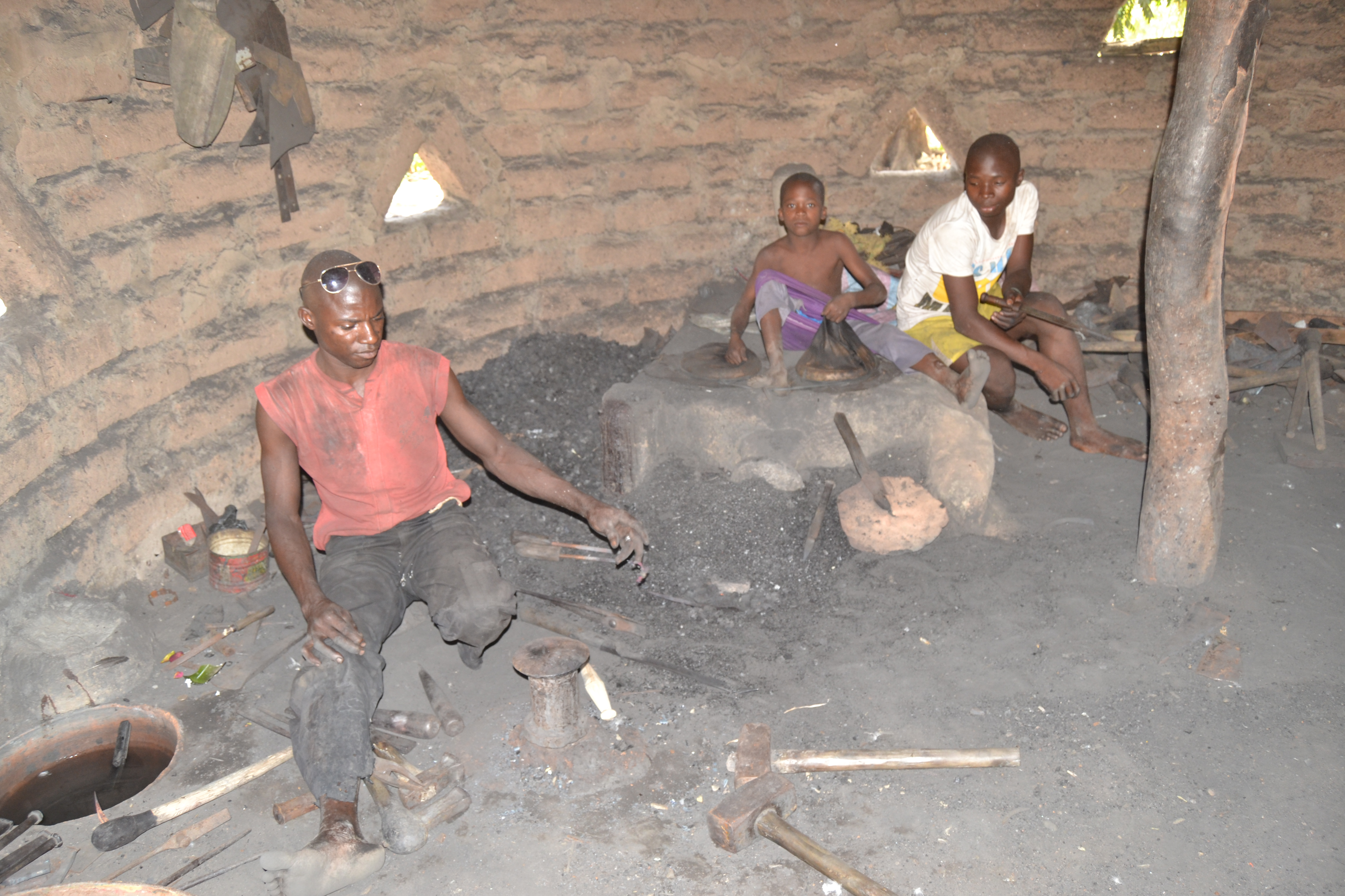 Un forgeron en activité, dans son atelier, à Ferké, une ville située au nord de la Côte d'Ivoire, à environ 600 km d'Abidjan, la capitale économique ivoirienne. This is an image of "African people at work" from Ivory Coast